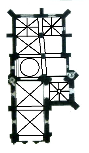 Saint-Fort-sur-Gironde église Plan